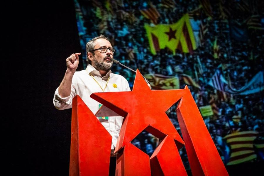 Antonio Baños a l'acte "Sí, per canviar-ho tot" al Barcelona Teatre Musical